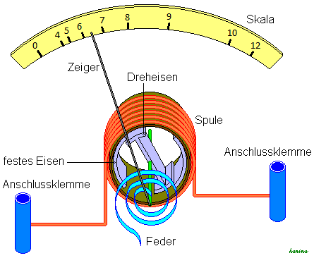 Funktion eines Dreheiseninstruments